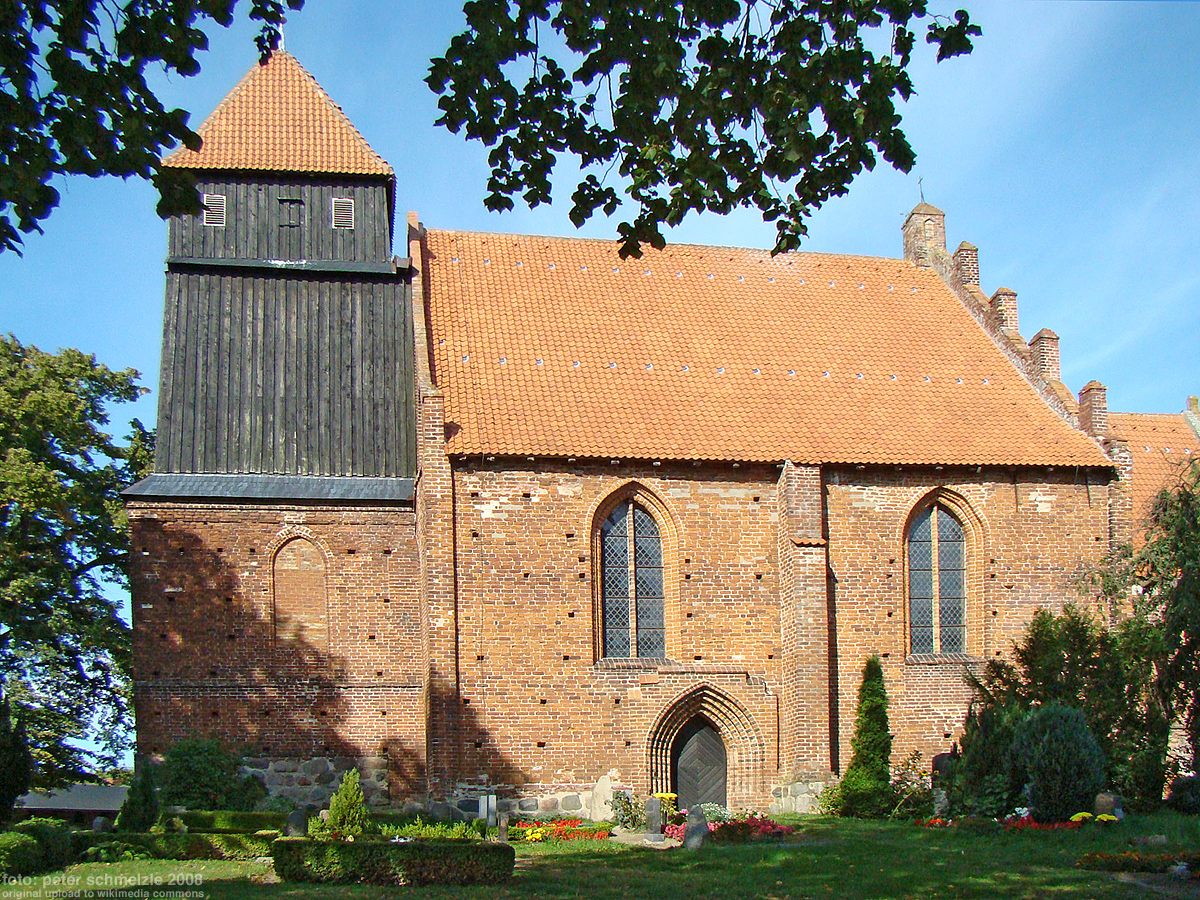 Dorfkirche in Reinberg (Landkreis Nordvorpommern).